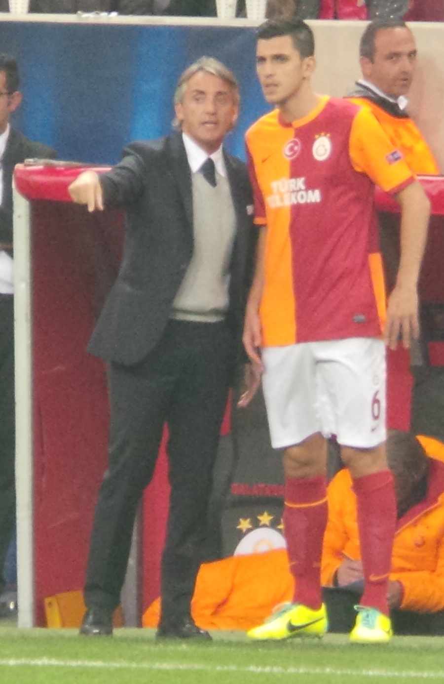 Ceyhun & Mancini @ FC Copenahgen match